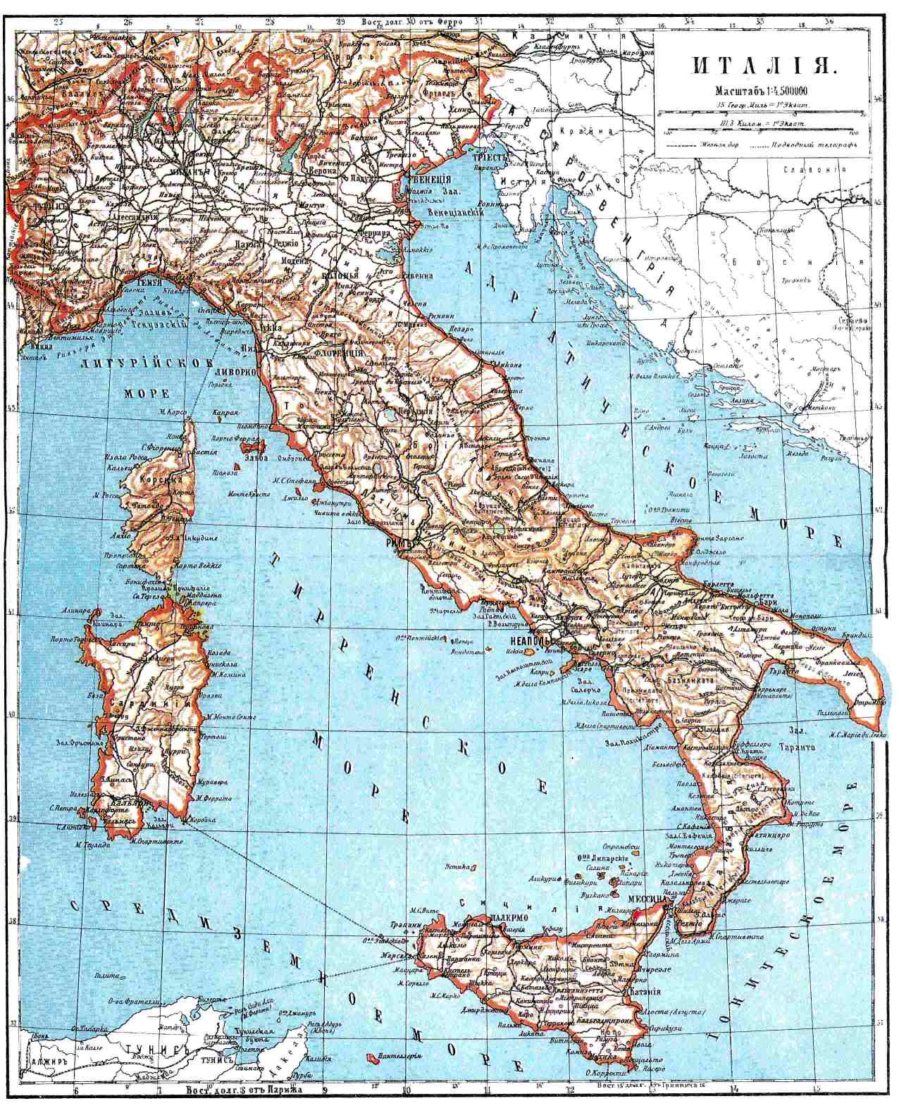 Карта Италии из энциклопедии Брокгауза и Ефрона